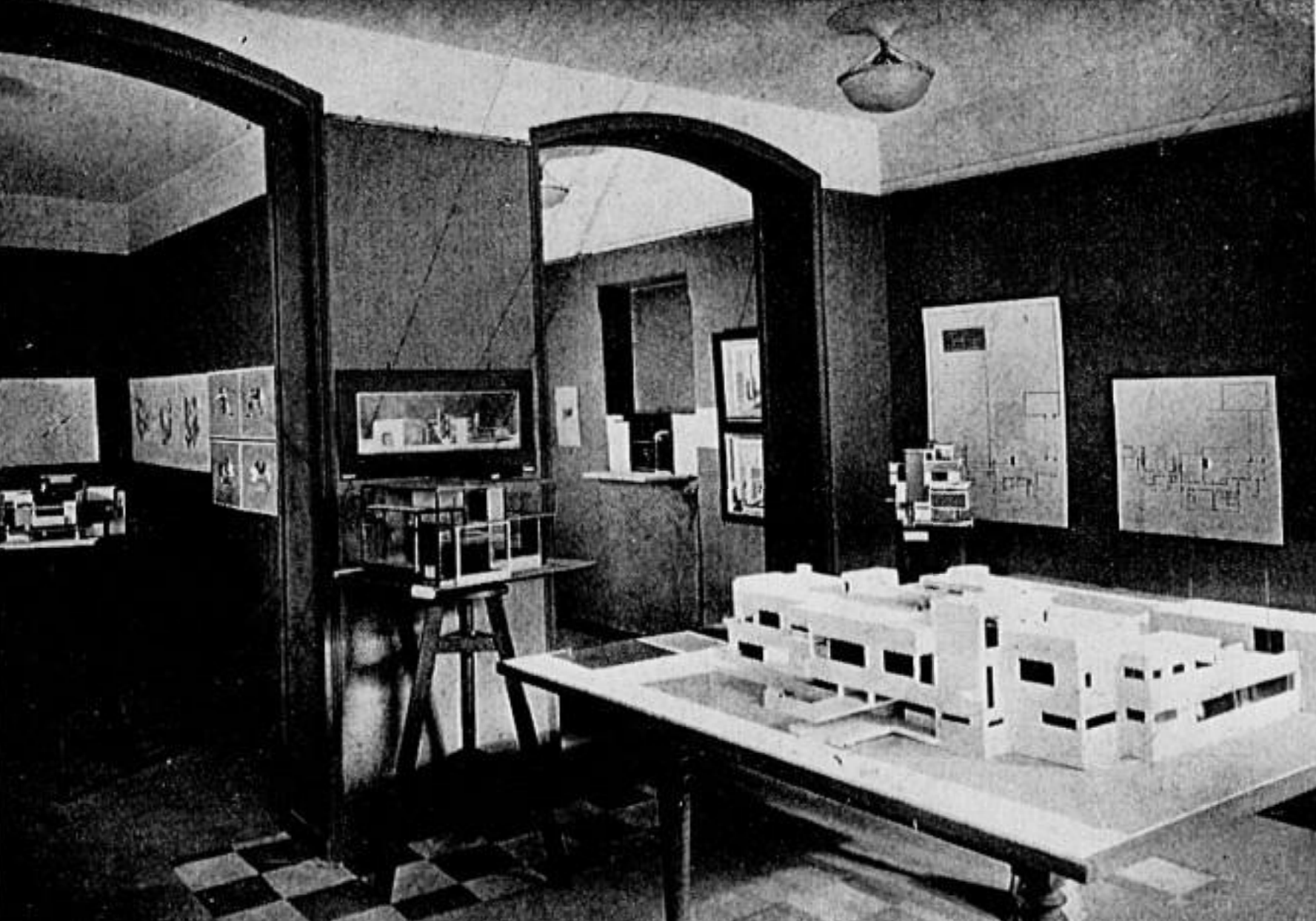 Exposition De Stijl, Galerie de l'Effort Moderne, Paris, 1923 (image du domaine public modifiée)